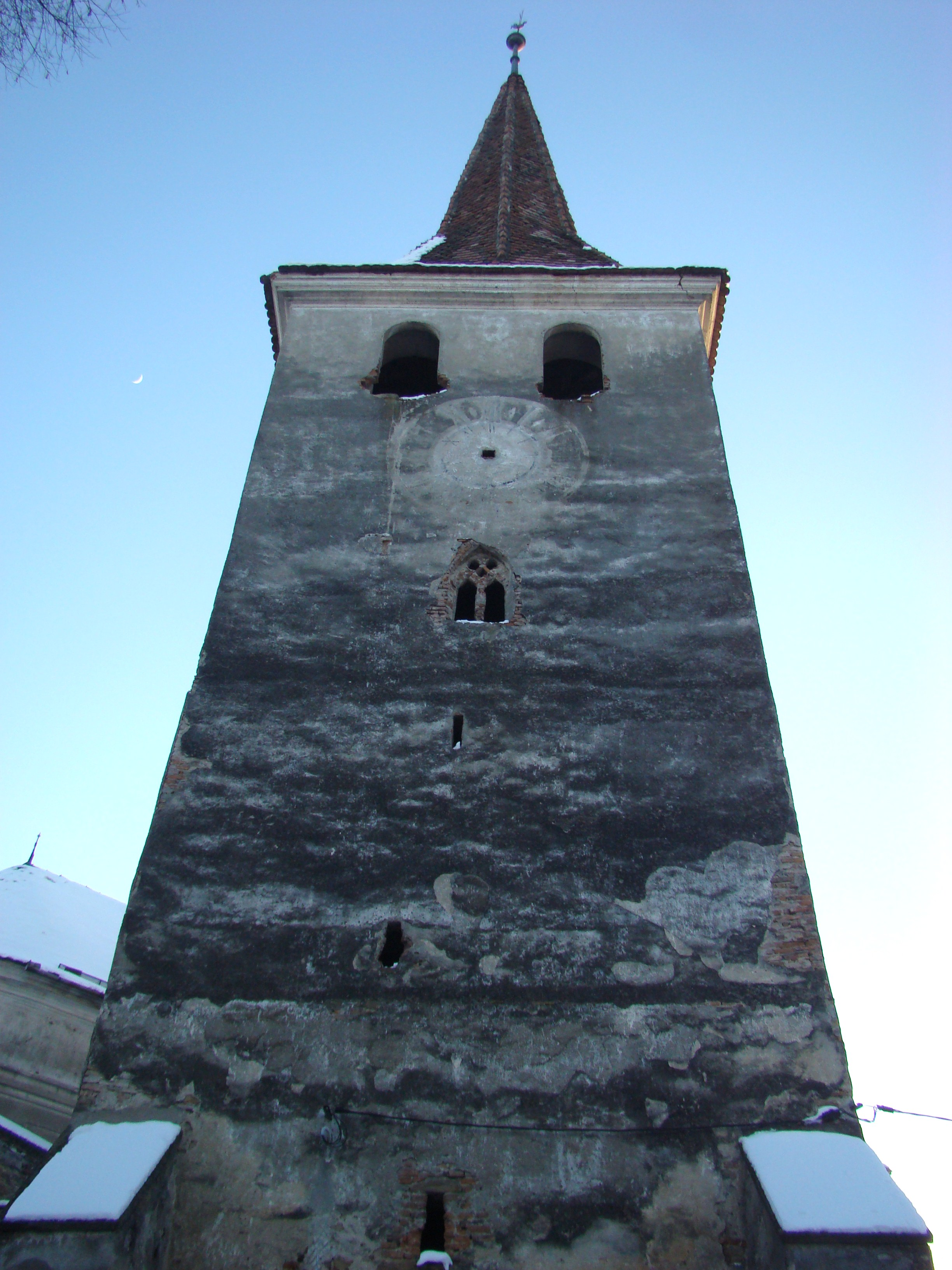 Turn-clopotniță (fost turn de poartă), sat Hoghilag; comuna Hoghilag 02